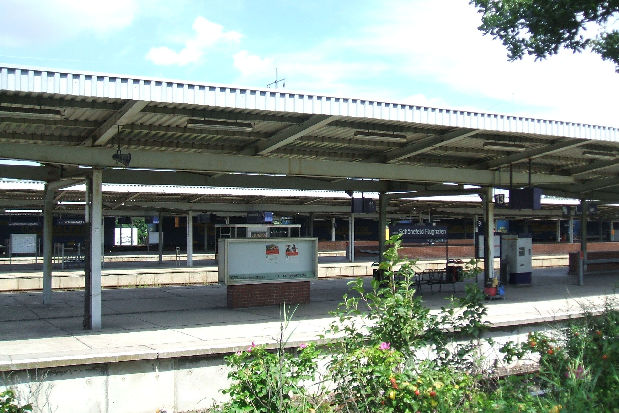 Bahnhof Berlin-Schoenefeld Flughafen, die Bahnsteige von der Straße aus